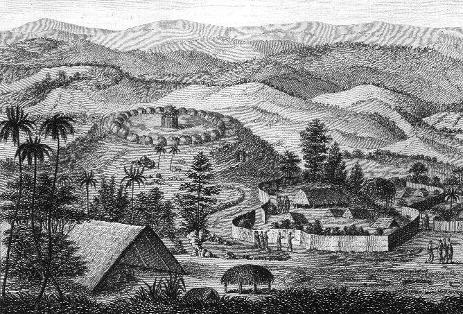 Erdhügel zur Taubenjagd auf Tongatapu in Tonga. Ausschnitt aus einer Grafik von 1799